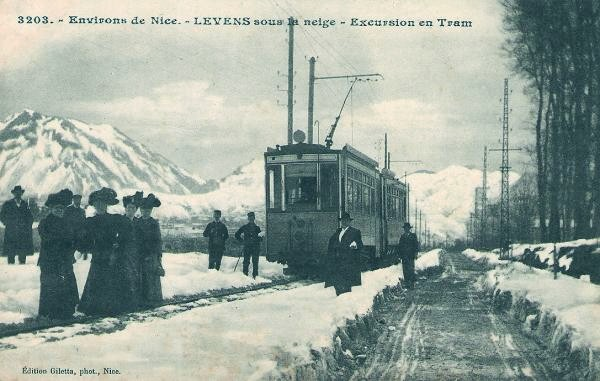 "Lou Trambalan" aux grands prés de Levens